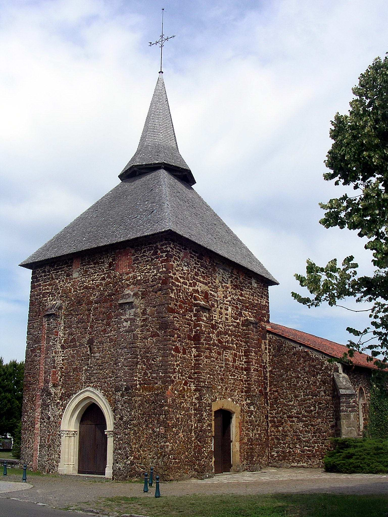 Église Saint-Jean-Baptiste de Mézos, dans le département français des Landes.